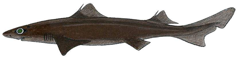 Centrophorus granulosus